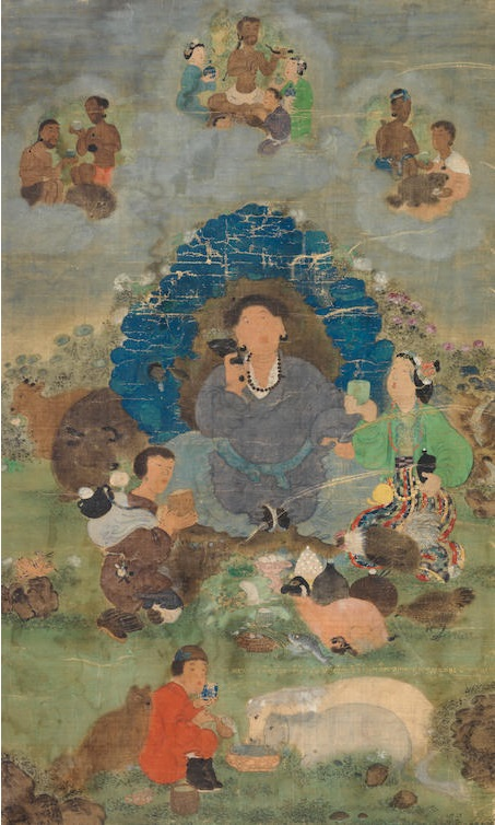 Marpa Receives The Poet-Saint Milarepalabel QS:Len,"Marpa Receives The Poet-Saint Milarepa" label QS:Lfr,"Marpa Lotsāwa reçoit Milarépa, sous le regard de Dagméma"